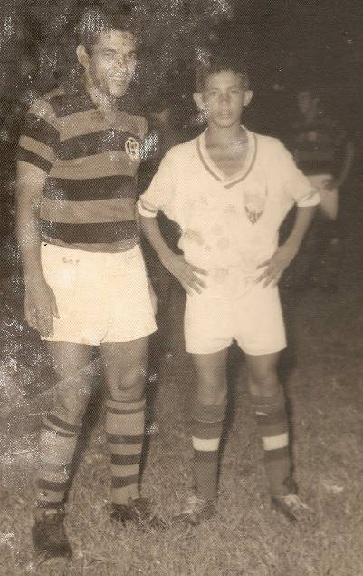 Nunes